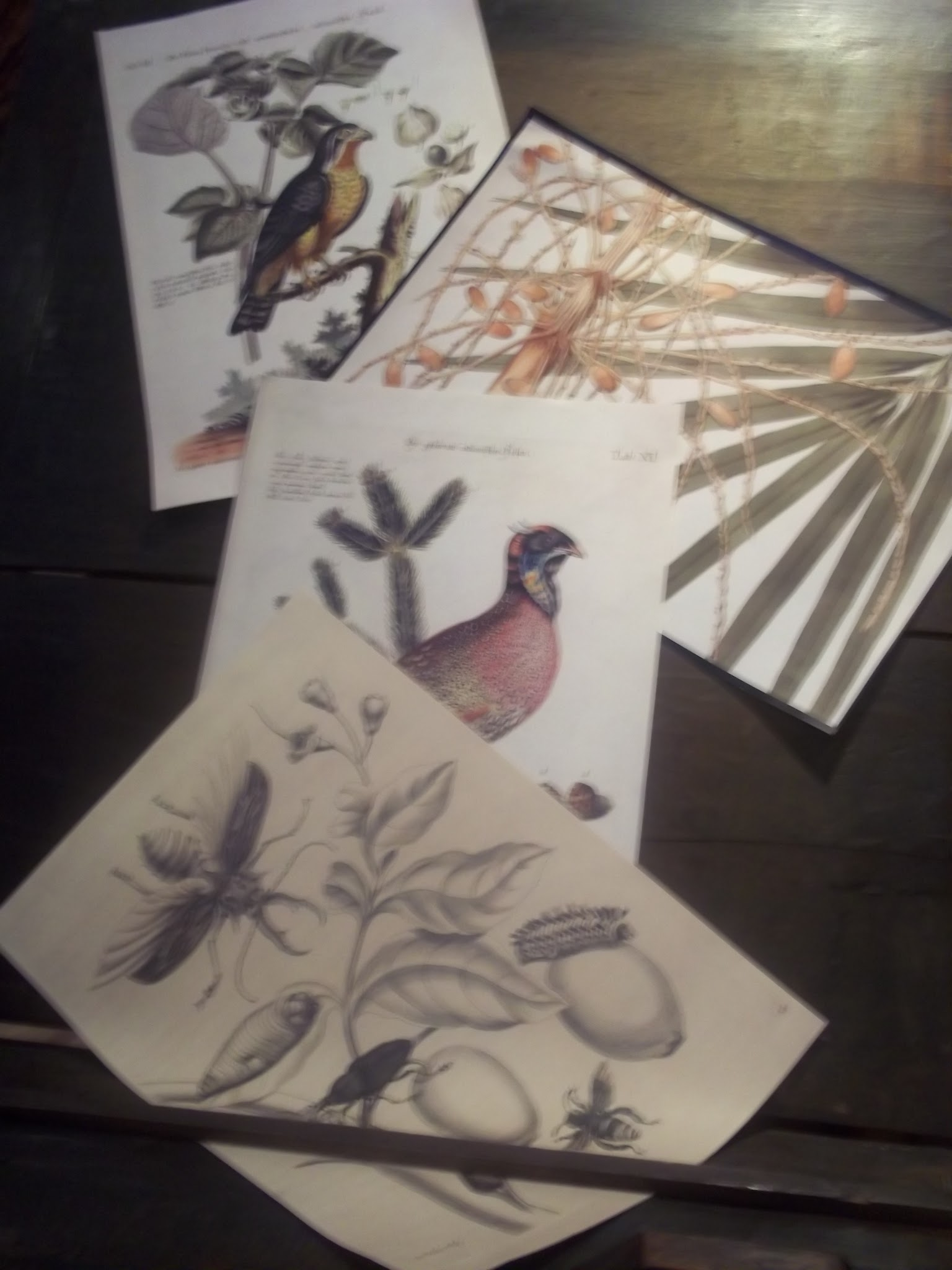 Ilustraciones realizadas por el botánico José Celestino Mutis en la expedición